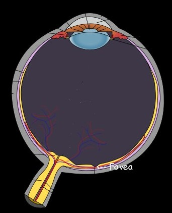 Schematische Darstellung des menschlichen Auges